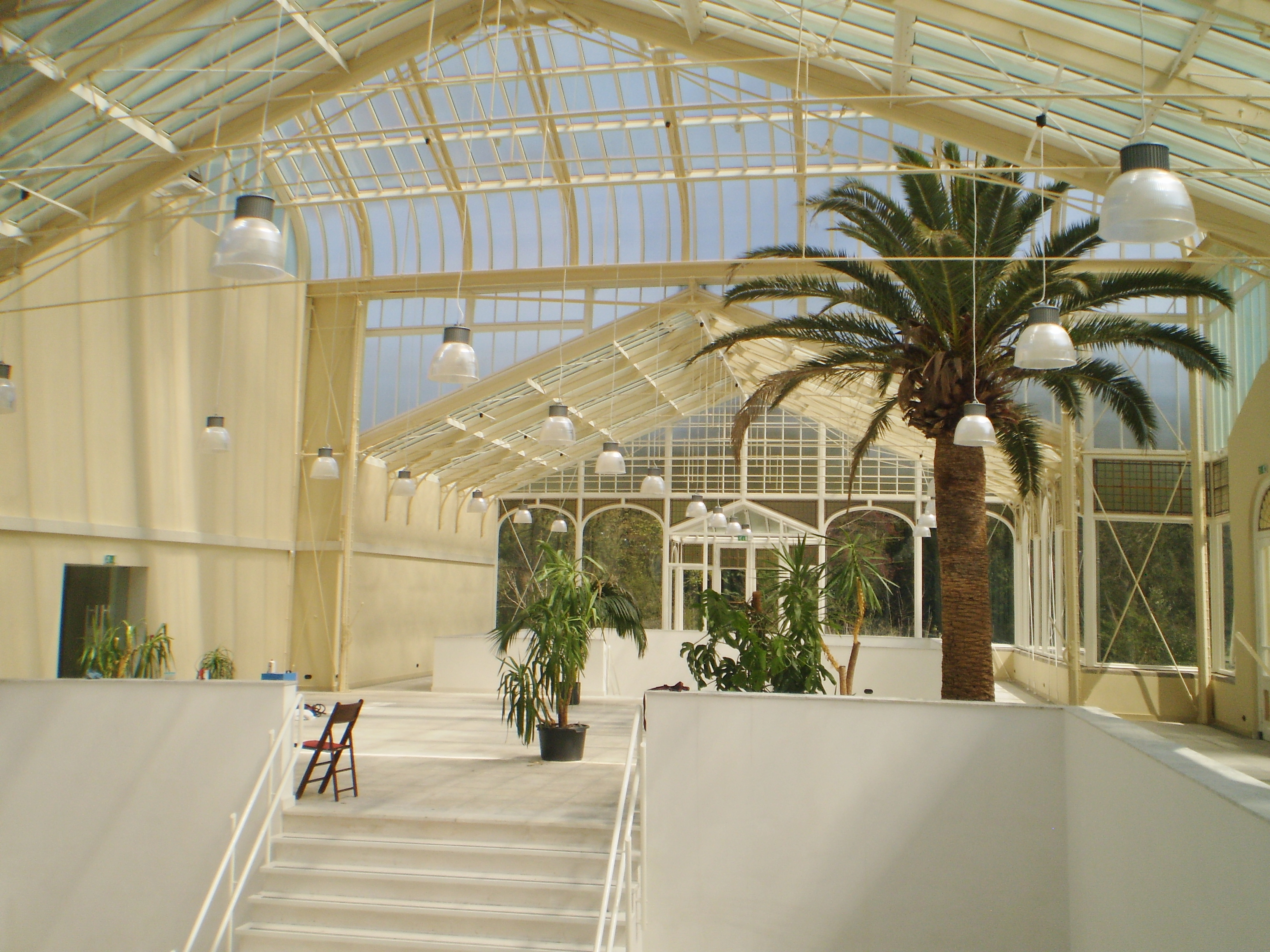 kas naar binnen gezien vanaf de westzijde